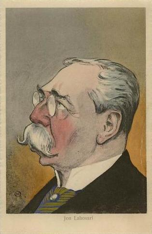 Nicolae Petrescu-Găină - Carte postala - Caricatura Ion Lahovari